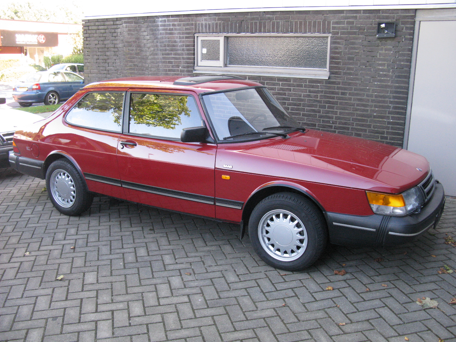 Saab 900i